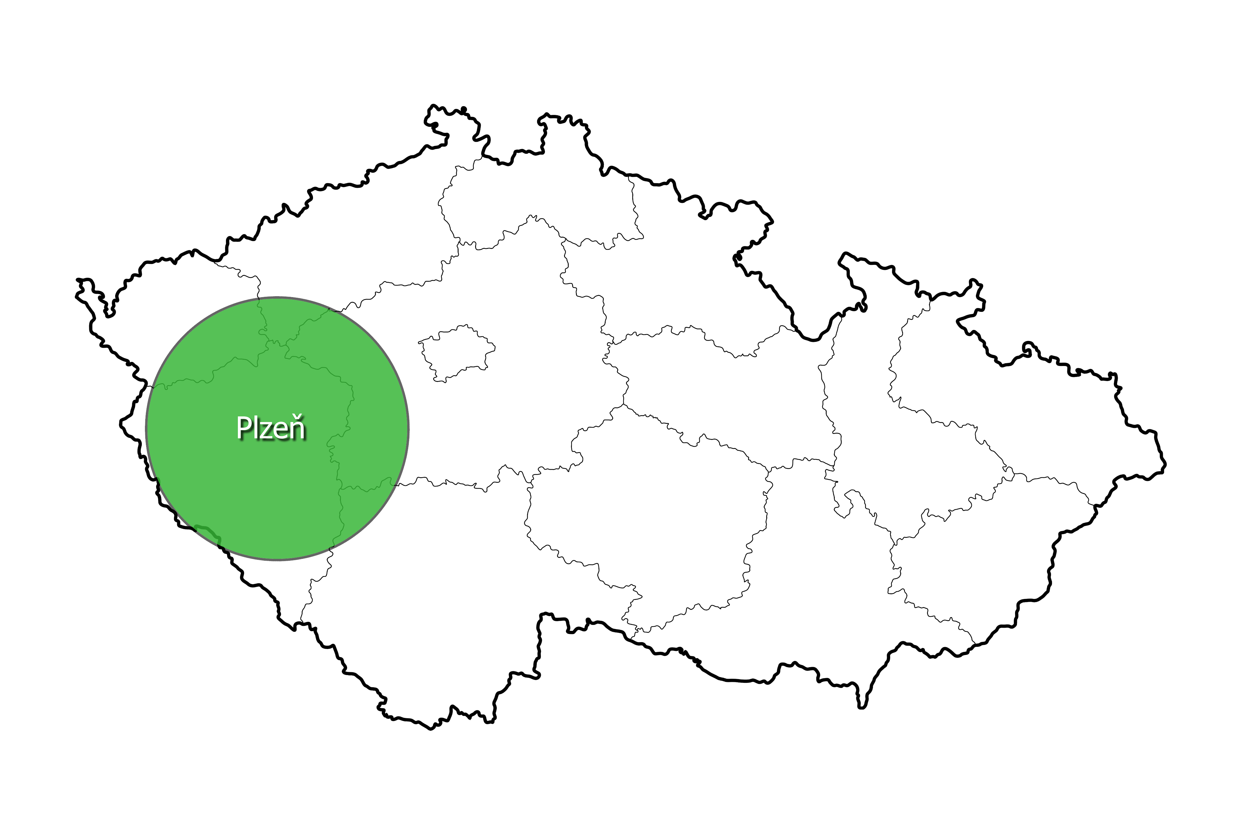 Poloha stanice letecké záchranné služby v Plzni